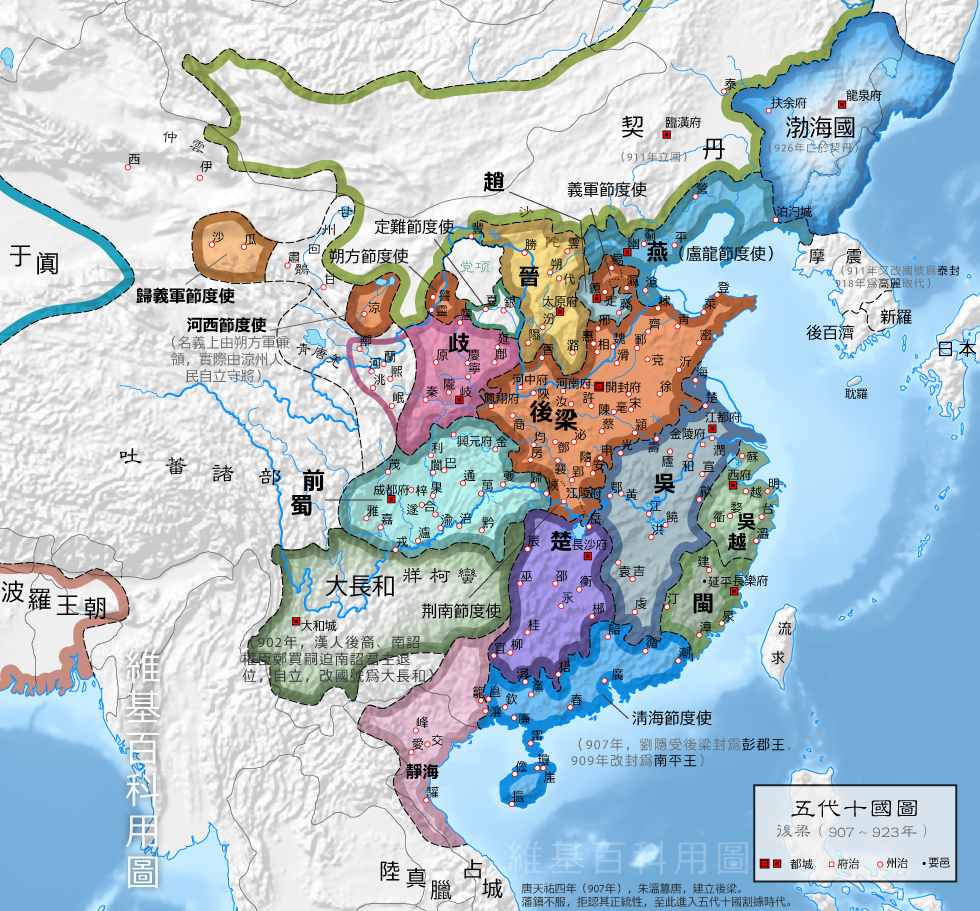 后梁前期